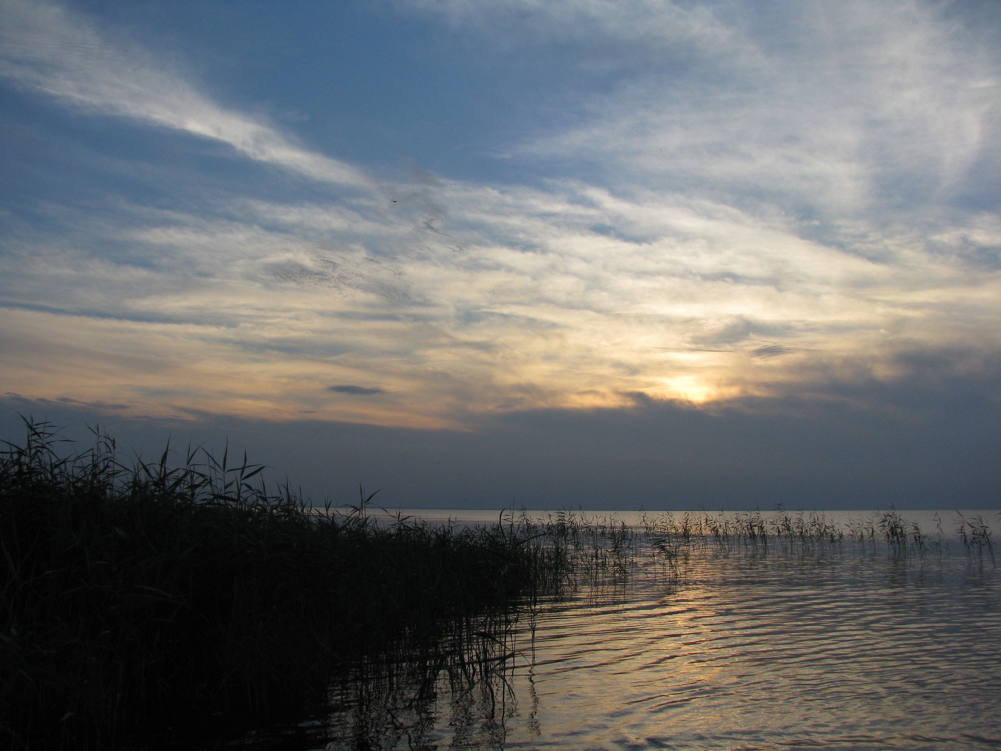 Piirissaarel